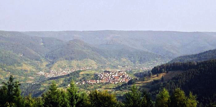 Schwarzwald, eigene Aufnahme, GNU FDL